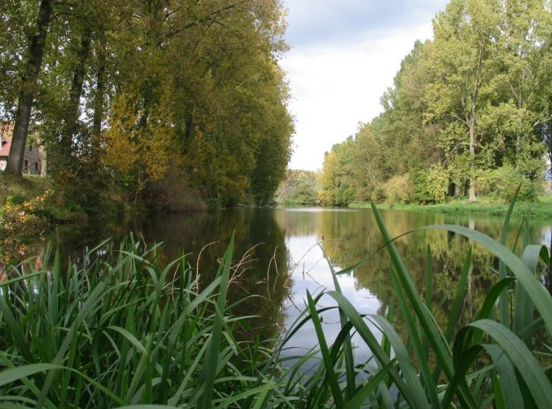 Oude Maas te Dilsen - eigen foto